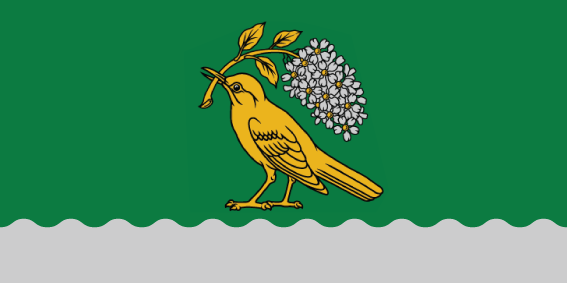 Viļānu novada karogs